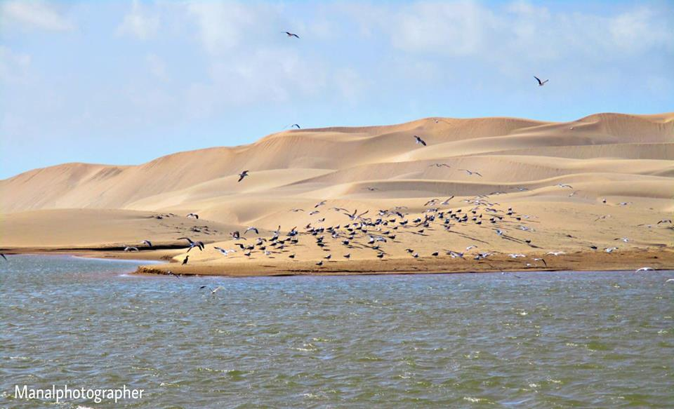 Lorsque la nature parle, elle révèle le secret de sa beauté.